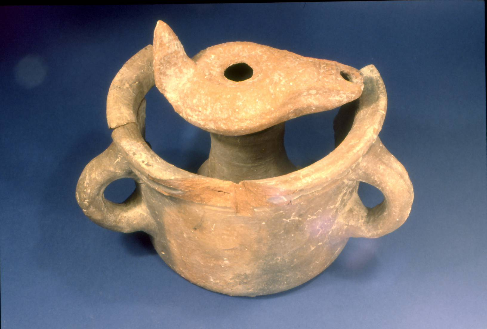 חורבת עוצה - כן לנר שבת ועליו הוצב לשם הצילום נר. שני הכלים נמצאו במצבורי שכבה 8 צילם הווארד סמיטליין